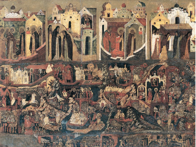 Русские города посылают воинов в Москву. Деталь композиции на тему «Сказание о Мамаевом побоище». Фрагмент иконы "Сергий Радонежский с житием", середина XVII века, Ярославль.